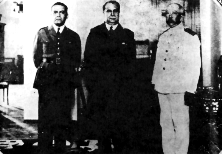 Junta Transitoria de Gobierno del Perú, que gobernó del 1 al 5 de marzo de 1931. Su presidente, Ricardo Leoncio Elías al centro, flanqueado, de izquierda a derecha por el coronel Manuel A. Ruíz Bravo y el capitán de navío Alejandro G. Vinces.